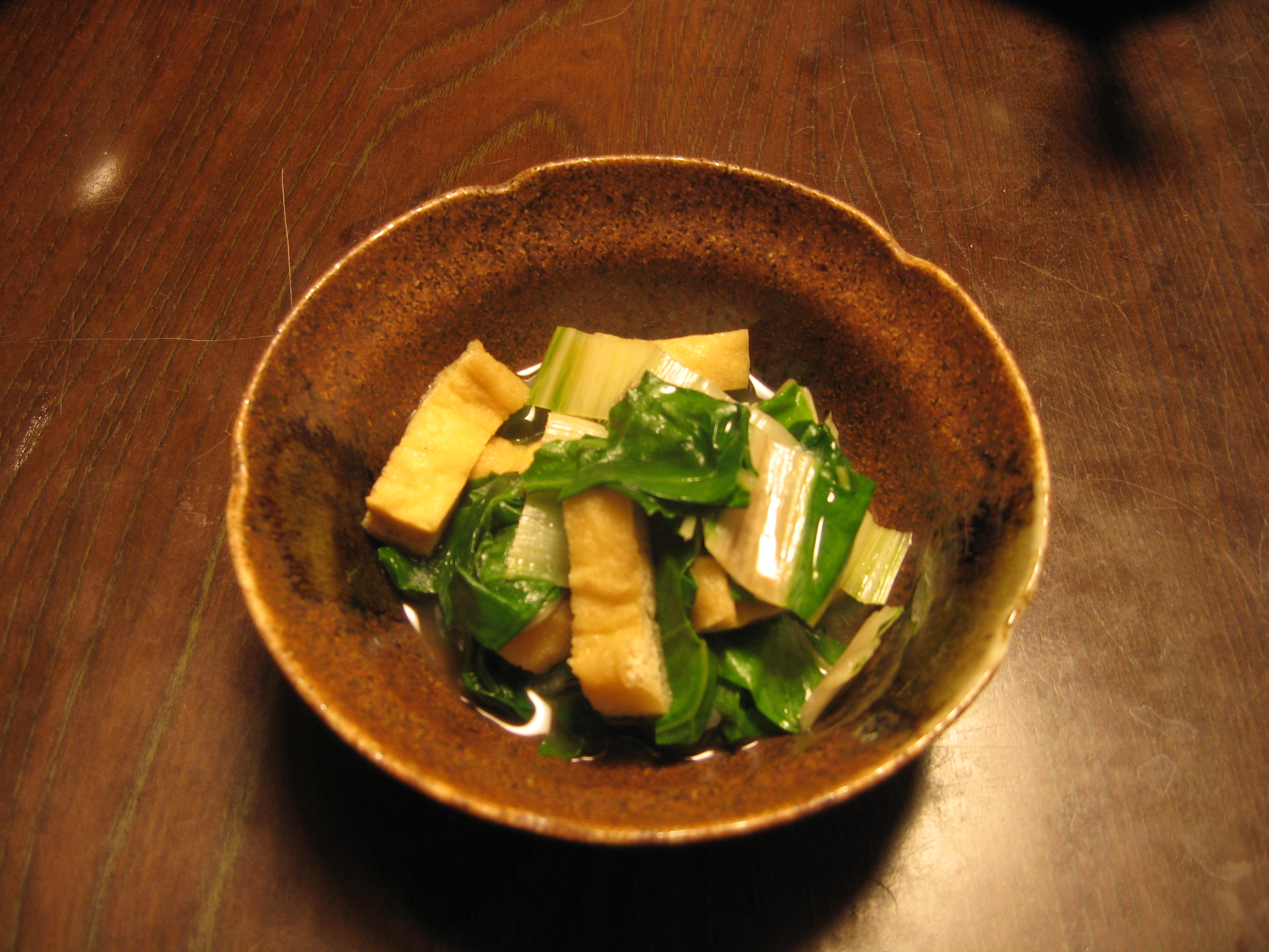 青菜とあぶらあげの煮浸し